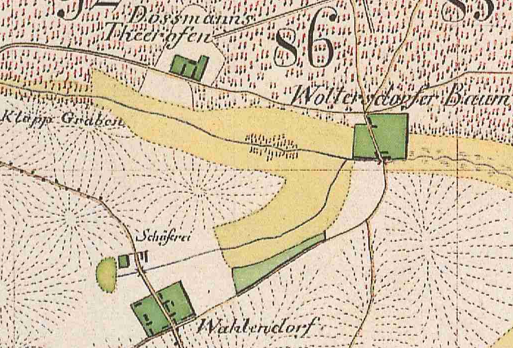 Dossmannsofen, Wahlendorf und Woltersdorfbaum, Gemeinde Märkisch Linden, Lkr. Ostprignitz-Ruppin, Brandenburg, Ausschnitt aus dem Urmesstischblatt 3042 Neuruppin von 1825